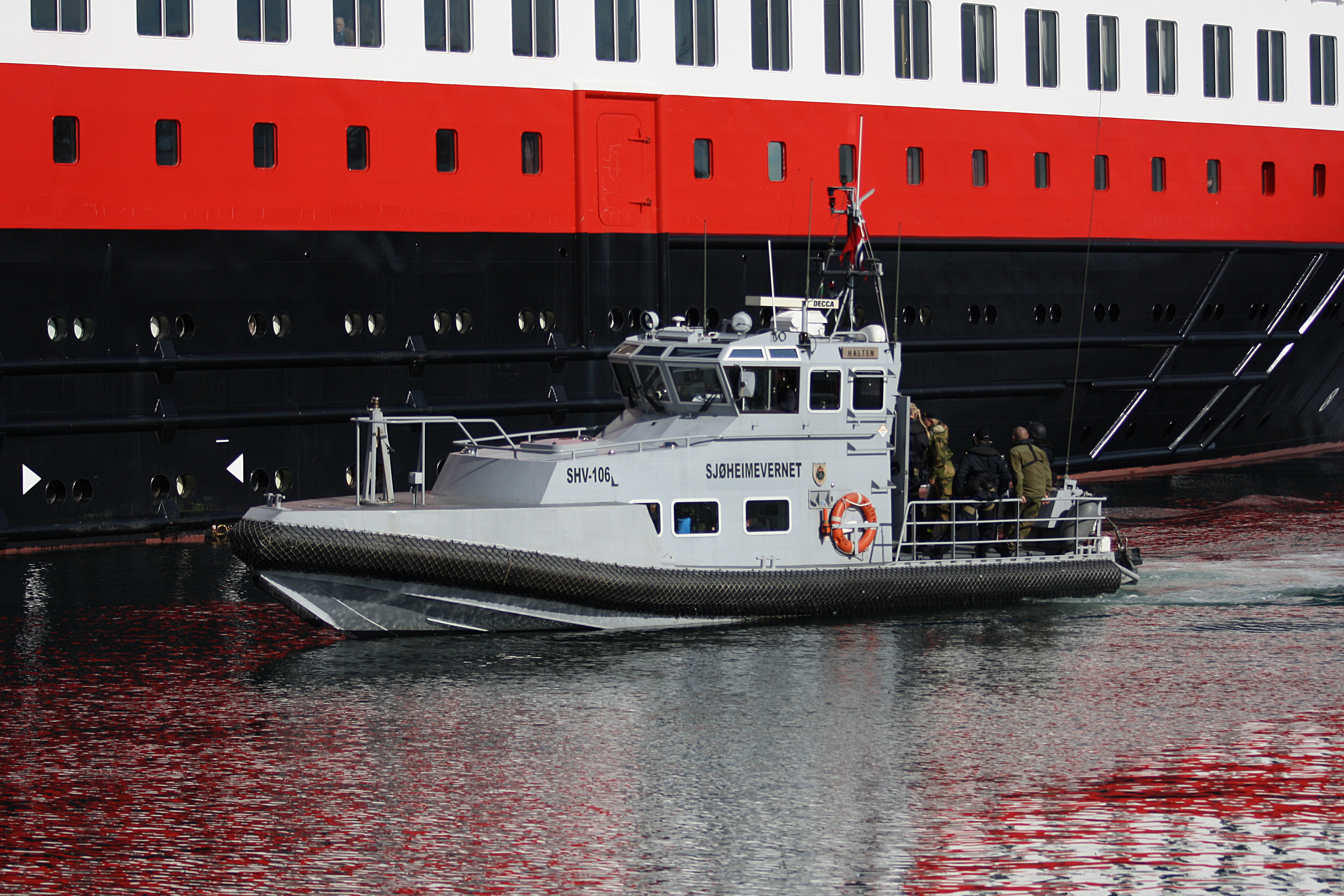 Sjøheimevernets fartøy Halten. Bak er hurtigruteskipet Finnmarken.